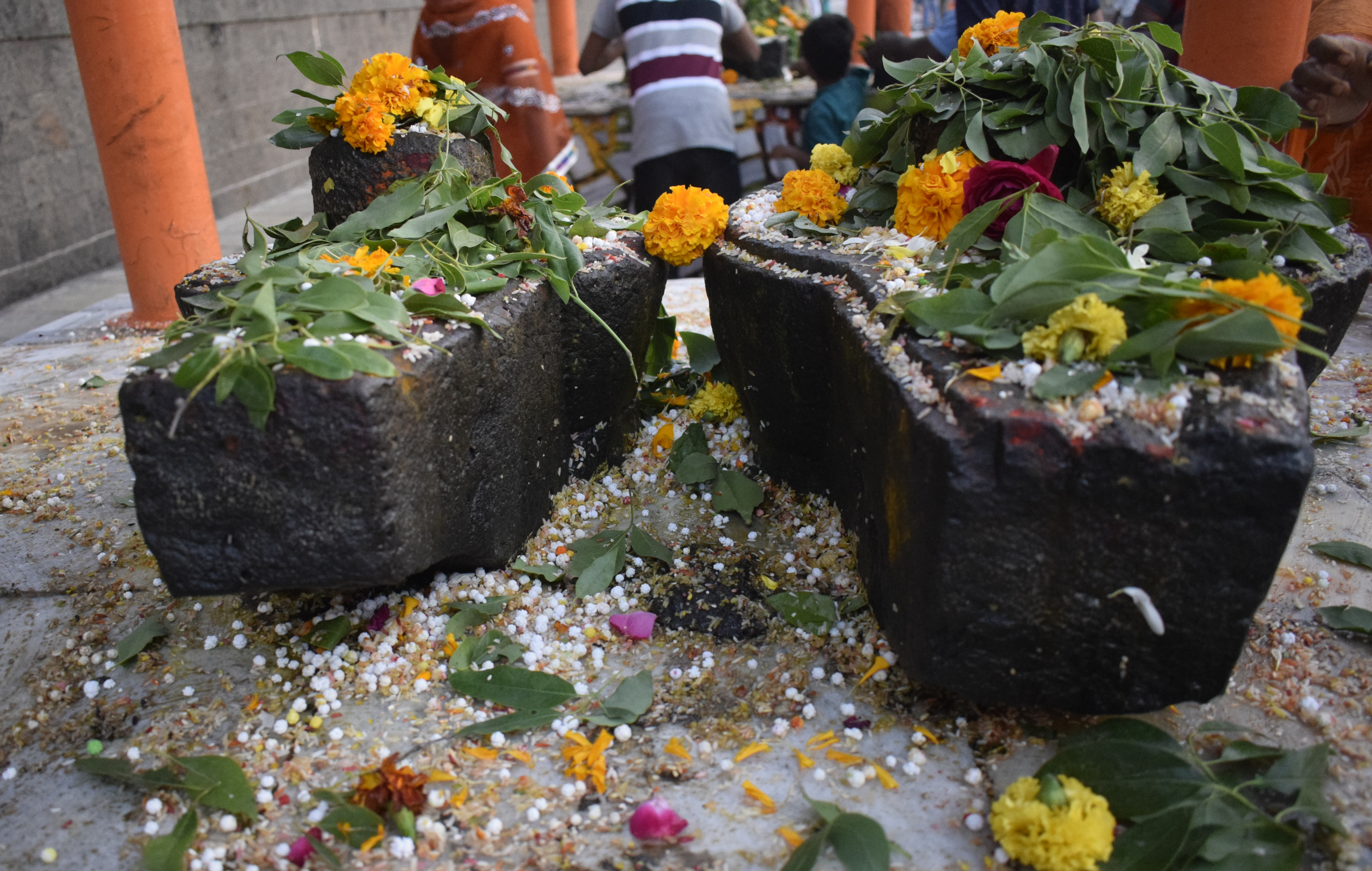 श्री पोपेश्वर लिंग